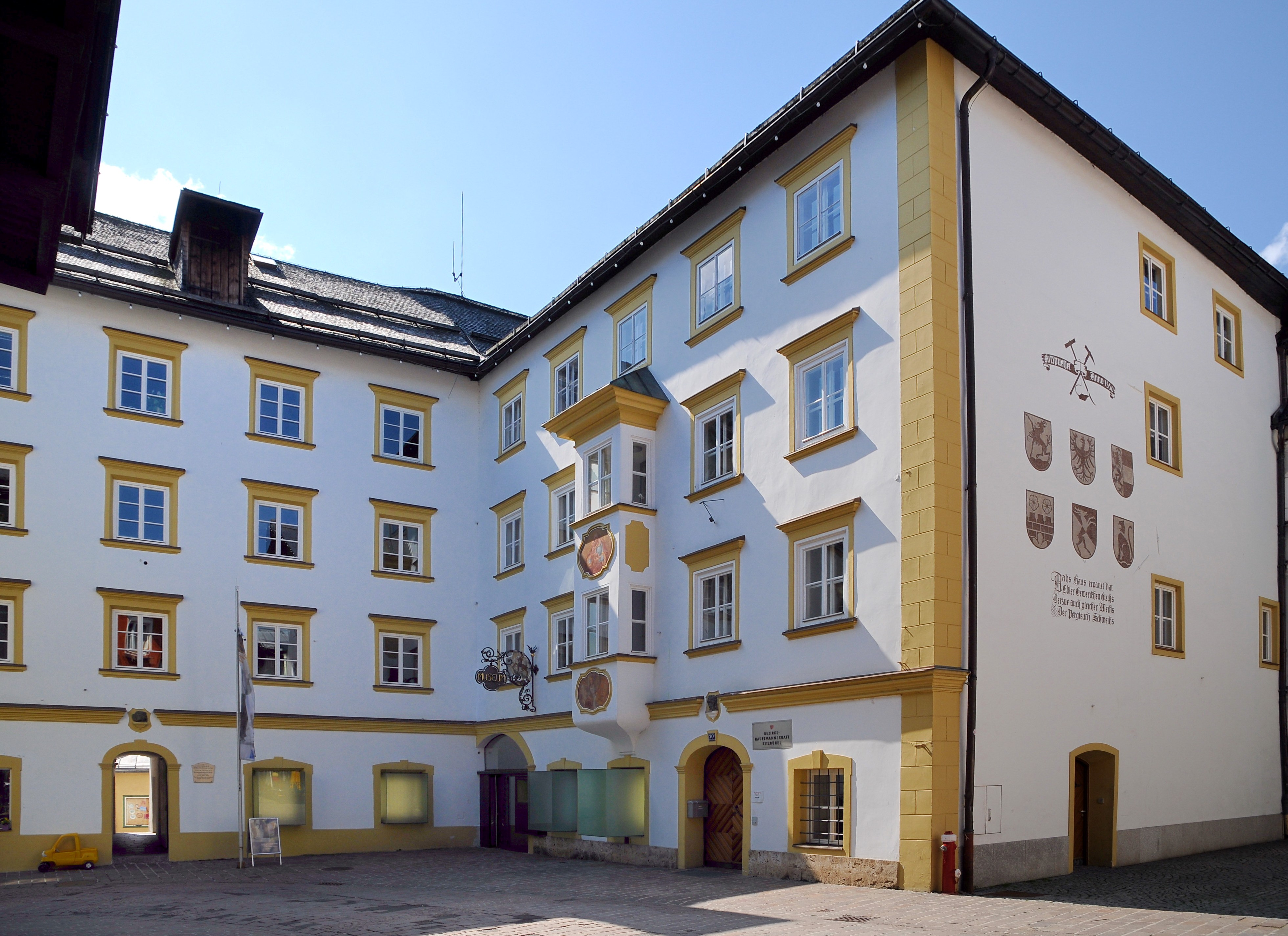 Museum Kitzbühel - Hinterstadt 32, Kitzbühel.